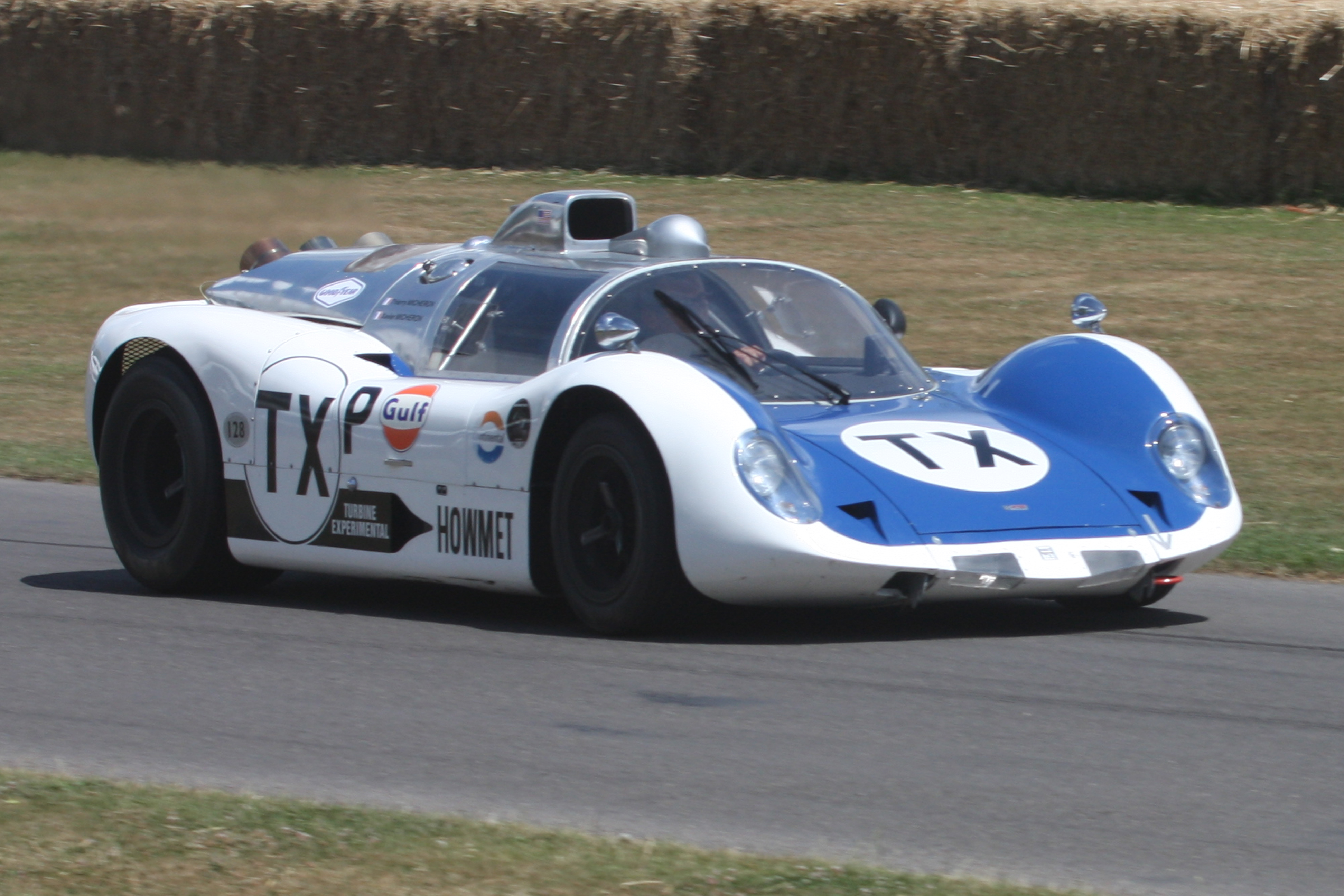 1968 Howmet TX